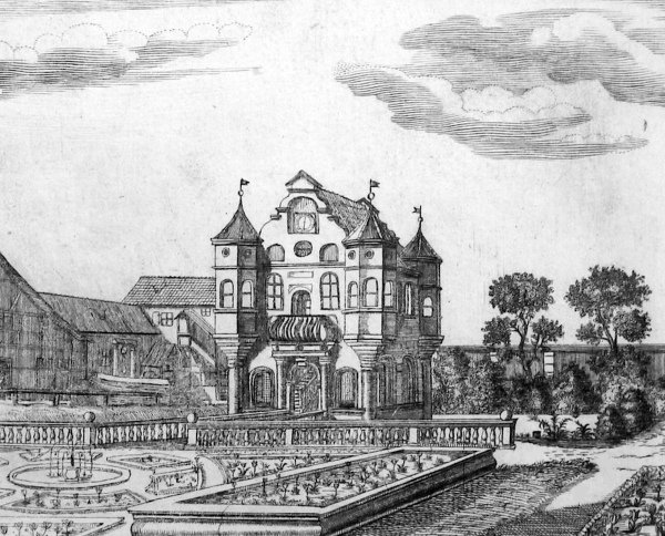 Kontumazgarten (Nürnberg), abgegangener Herrensitz, „Vargethschloß“